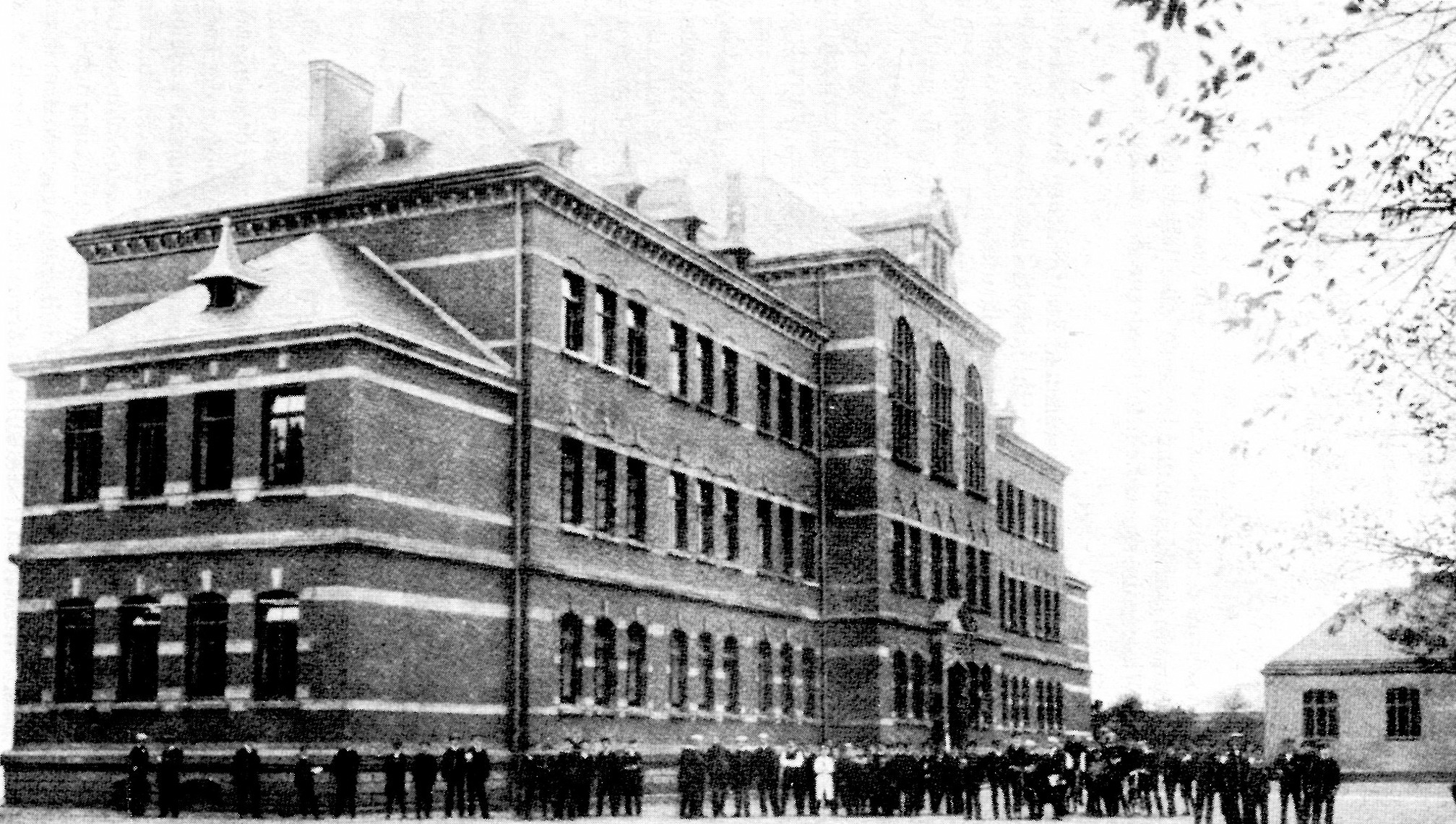 Ludwigsgymnasium Saarbrücken nach Fertigstellung 1892